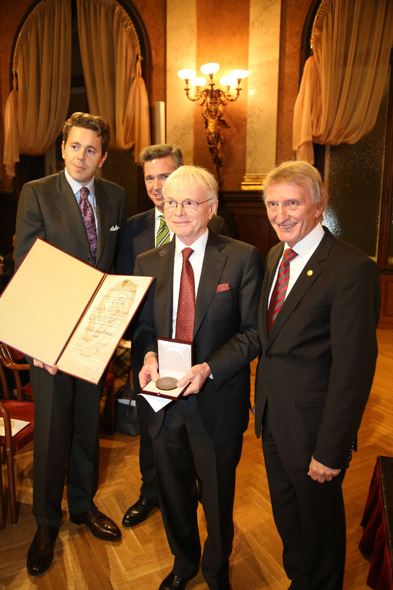 Verleihung der Wilhelm Exner Medaille am 18. November 2014 im Österreichischer Gewerbeverein: Harald Mahrer, Andreas Gnesda, Thomas J.R. Hughes, Hans Sünkel